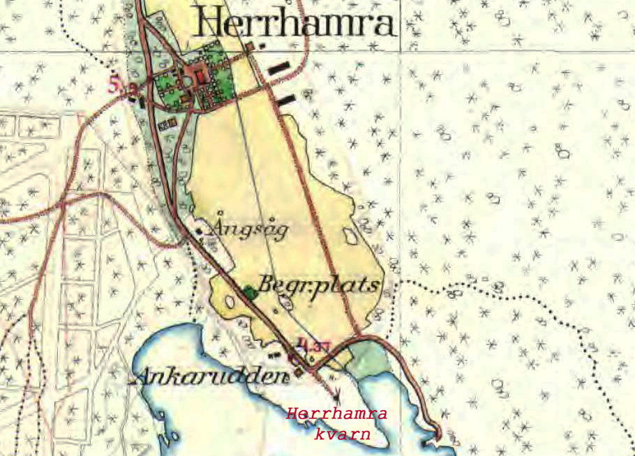 Herrhamra gård och kvarn på Häradsekonomiska kartan 1901